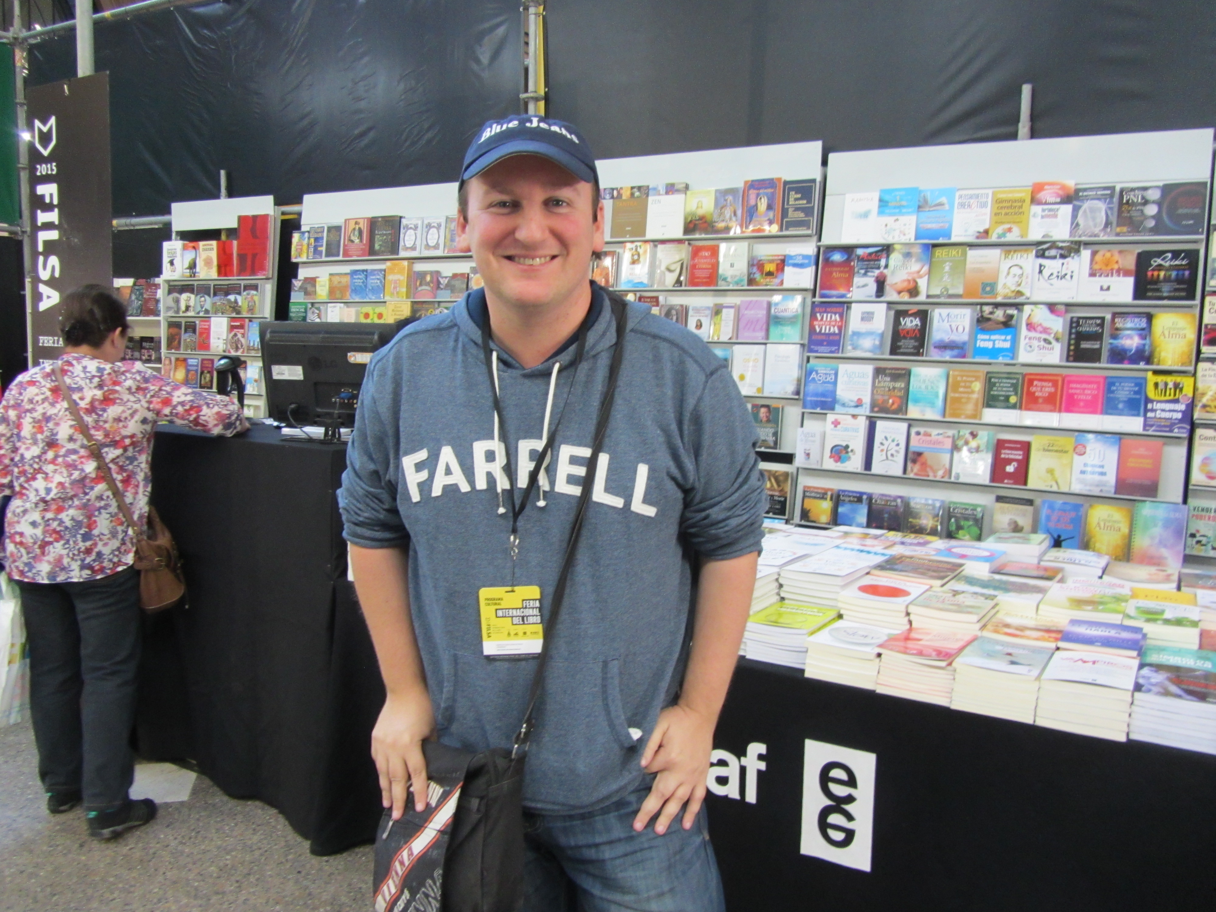 El escritor español Blue Jeans en la Feria Internacional del Libro de Santiago 2015